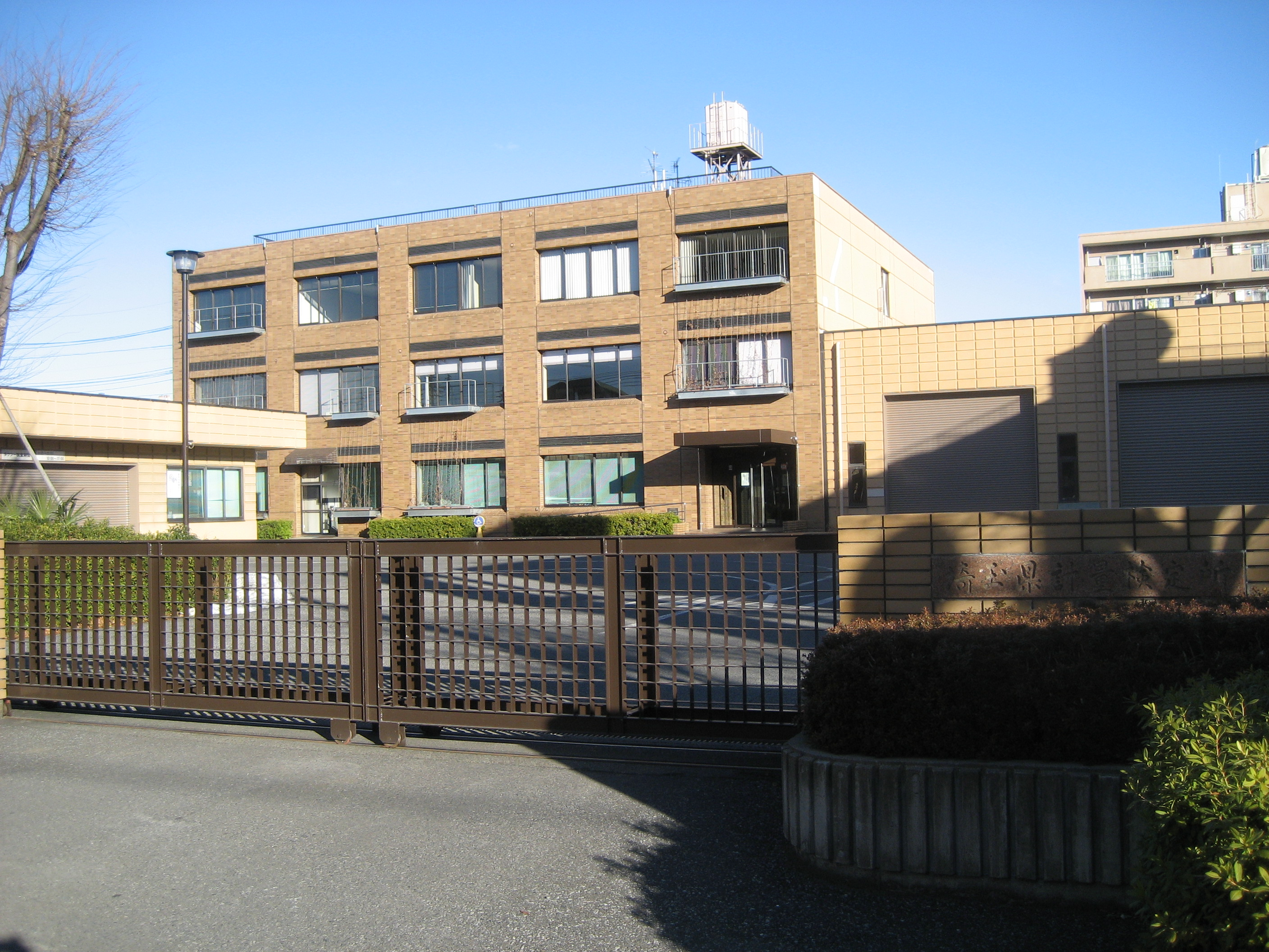 さいたま市北区にある埼玉県計量検定所